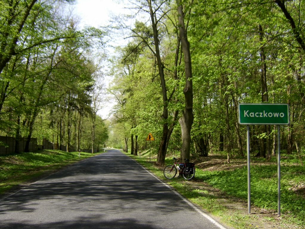 Wieś Kaczkowo